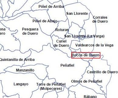 Mapa de la comarca de Peñafiel, con Bocos en el extremo oriental